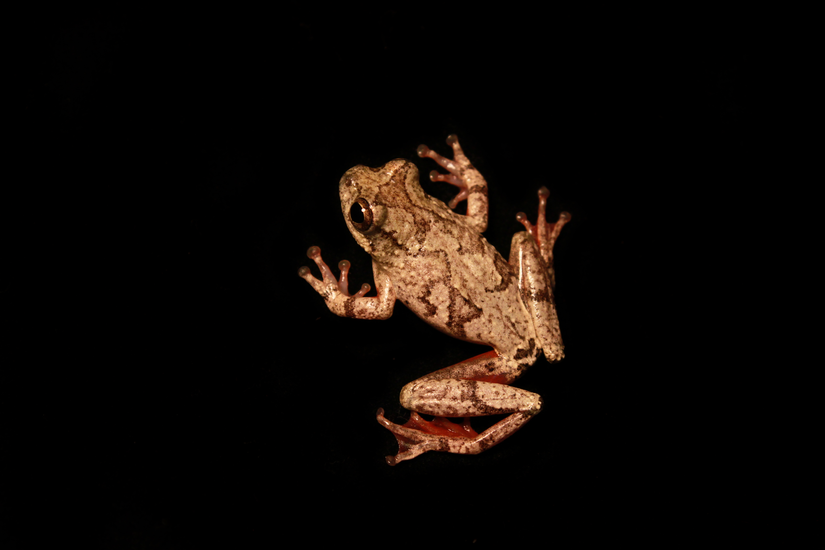 Hyperolius tuberculatus. Libreville, Gabon.